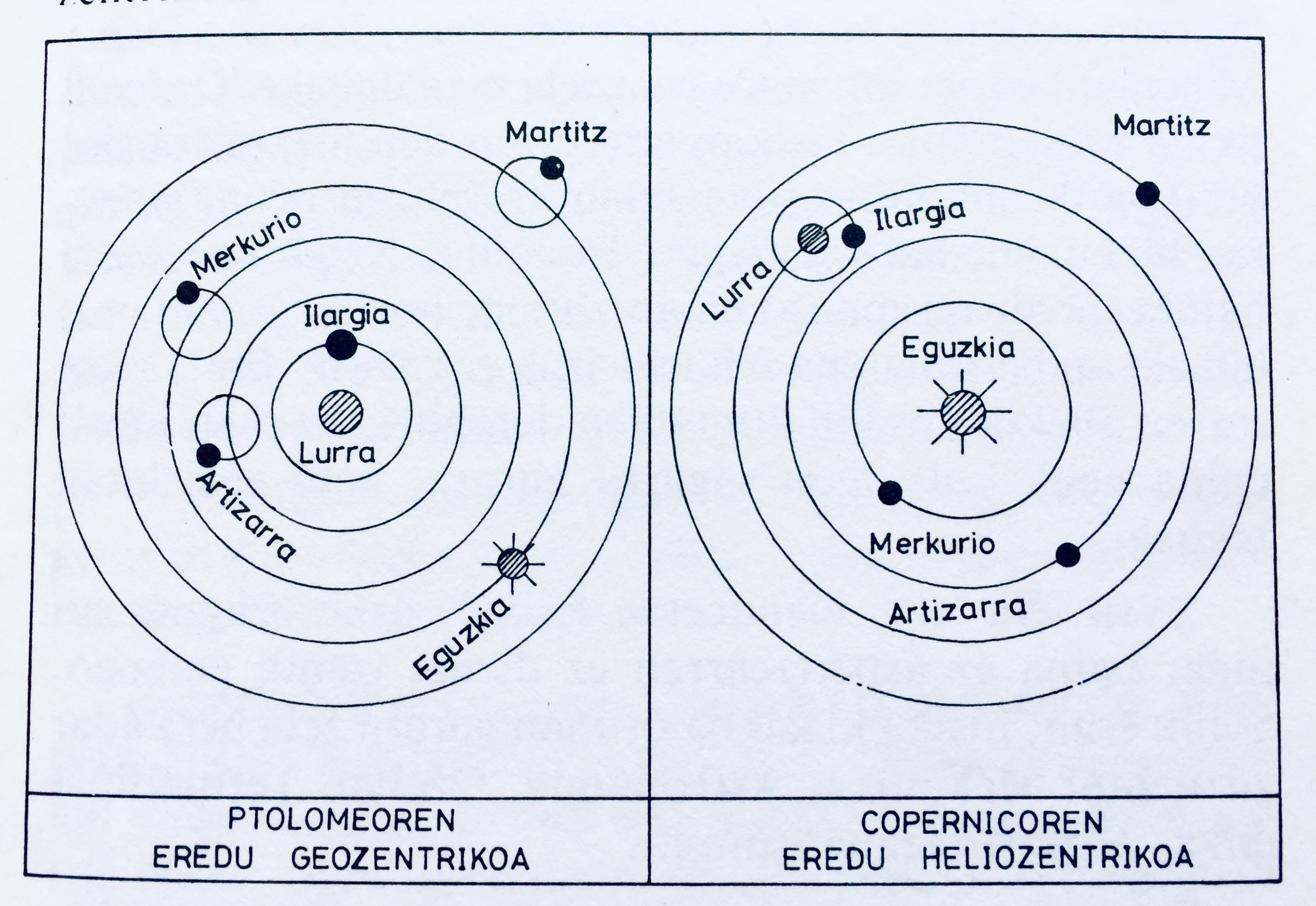 Ptolomeoren eredu geozentrikoa. Eta Kopernikoren eredu heliozentrikoa.